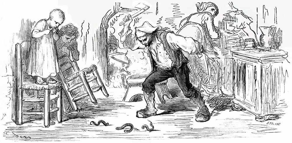 grafika z książki PL Bajki, Jean de La Fontaine, nakładem i drukiem Jana Noskowskiego, Warszawa 1876